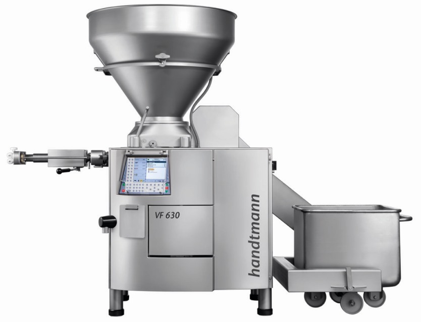 Vakuumfüller VF630 mit Abdrehgetriebe AG410 und Haltevorrichtung HV416 - frontale Ansicht